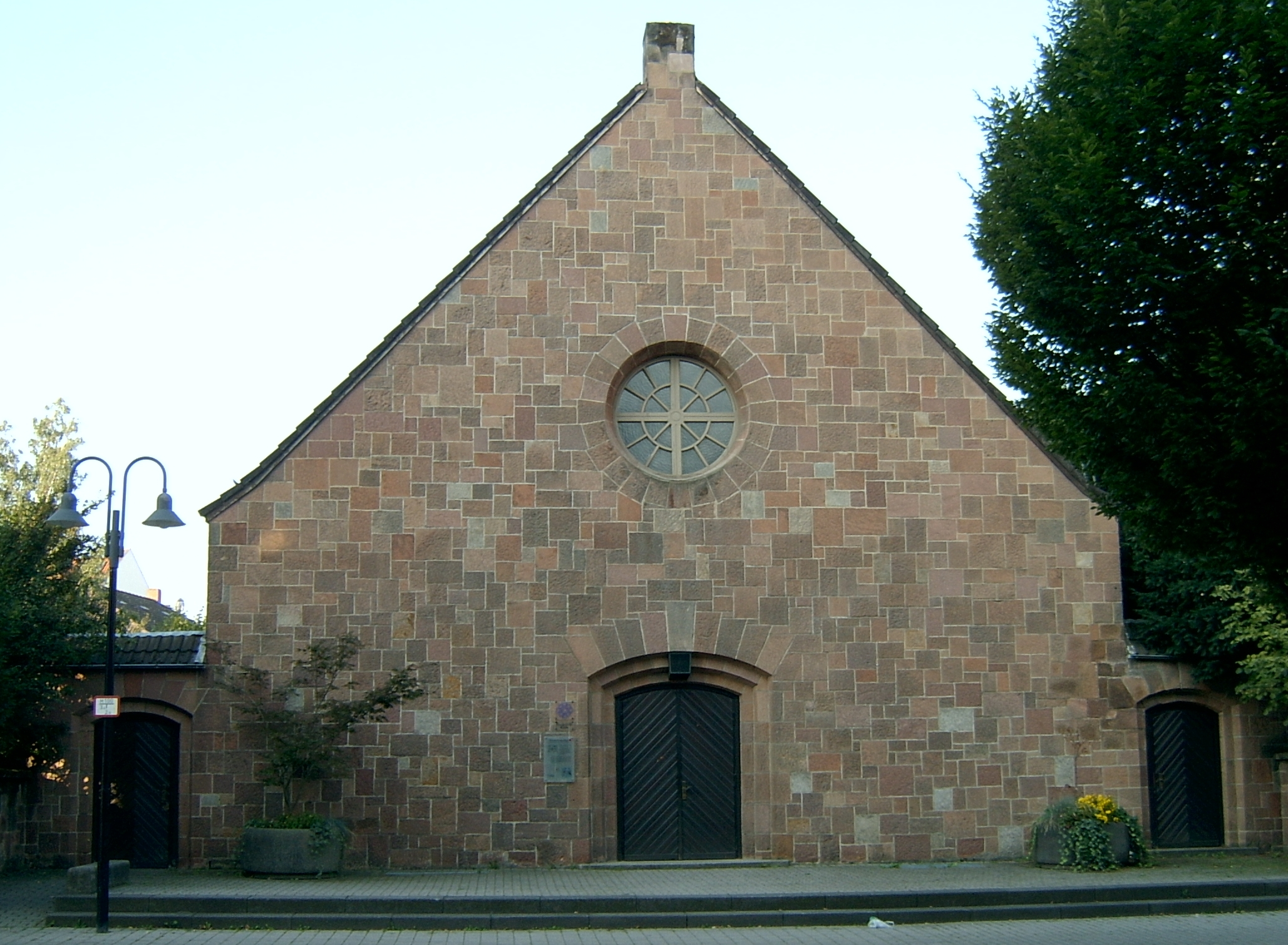 Die Vorderansicht der Pankratiuskapelle in Gießen.